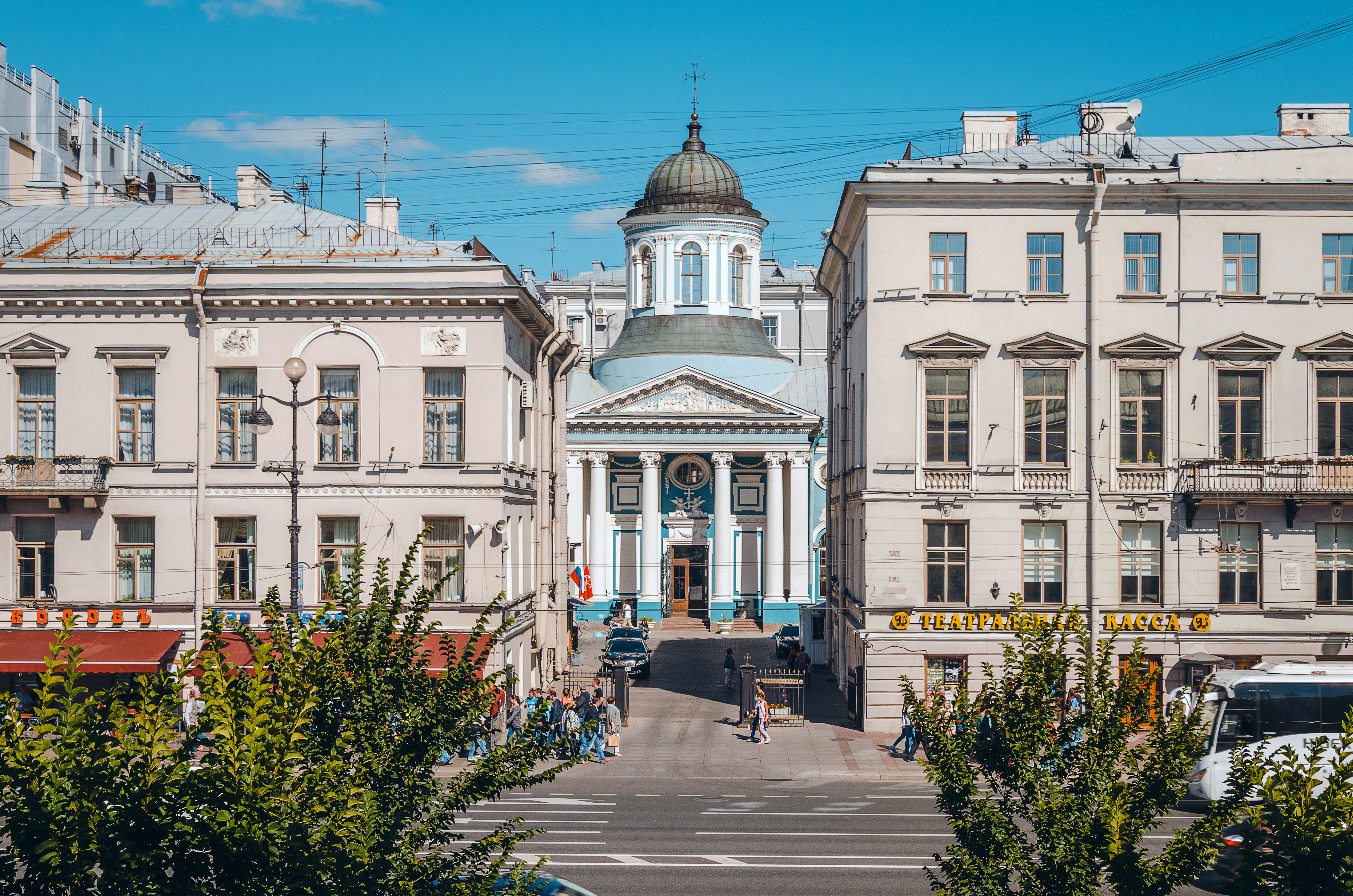 Невский проспект и Армянская церковь Святой Екатерины, Санкт-Петербург